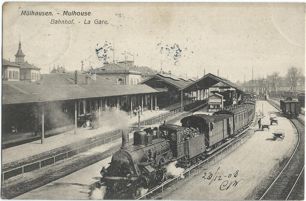 Vue de Mulhouse au début du XXe siècle (carte postale).